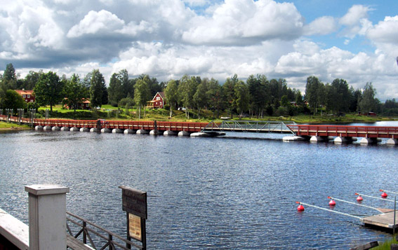 Flottbron i Gagnef